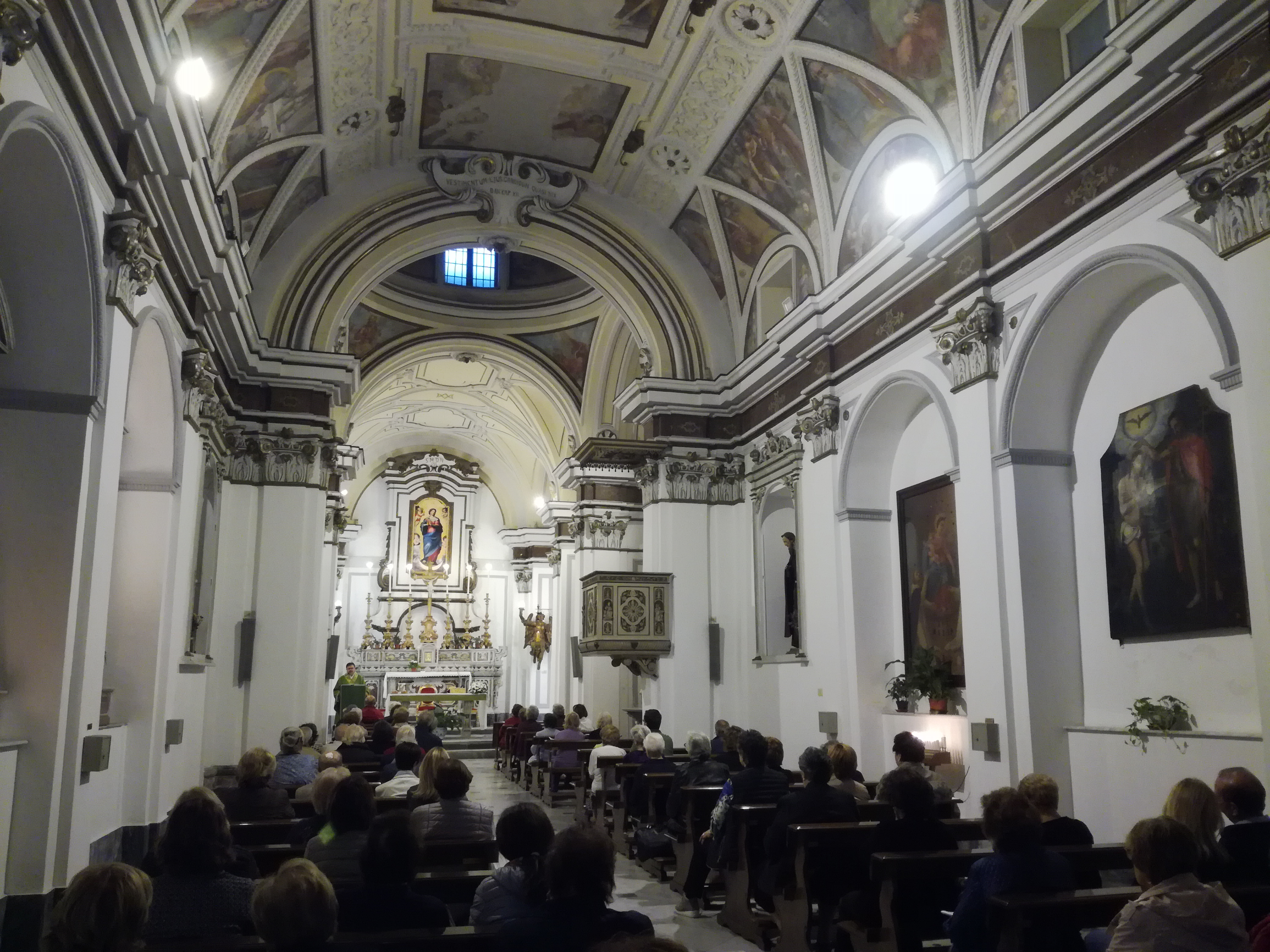 Interno di S. Maria della Neve in San Giuseppe, Napoli